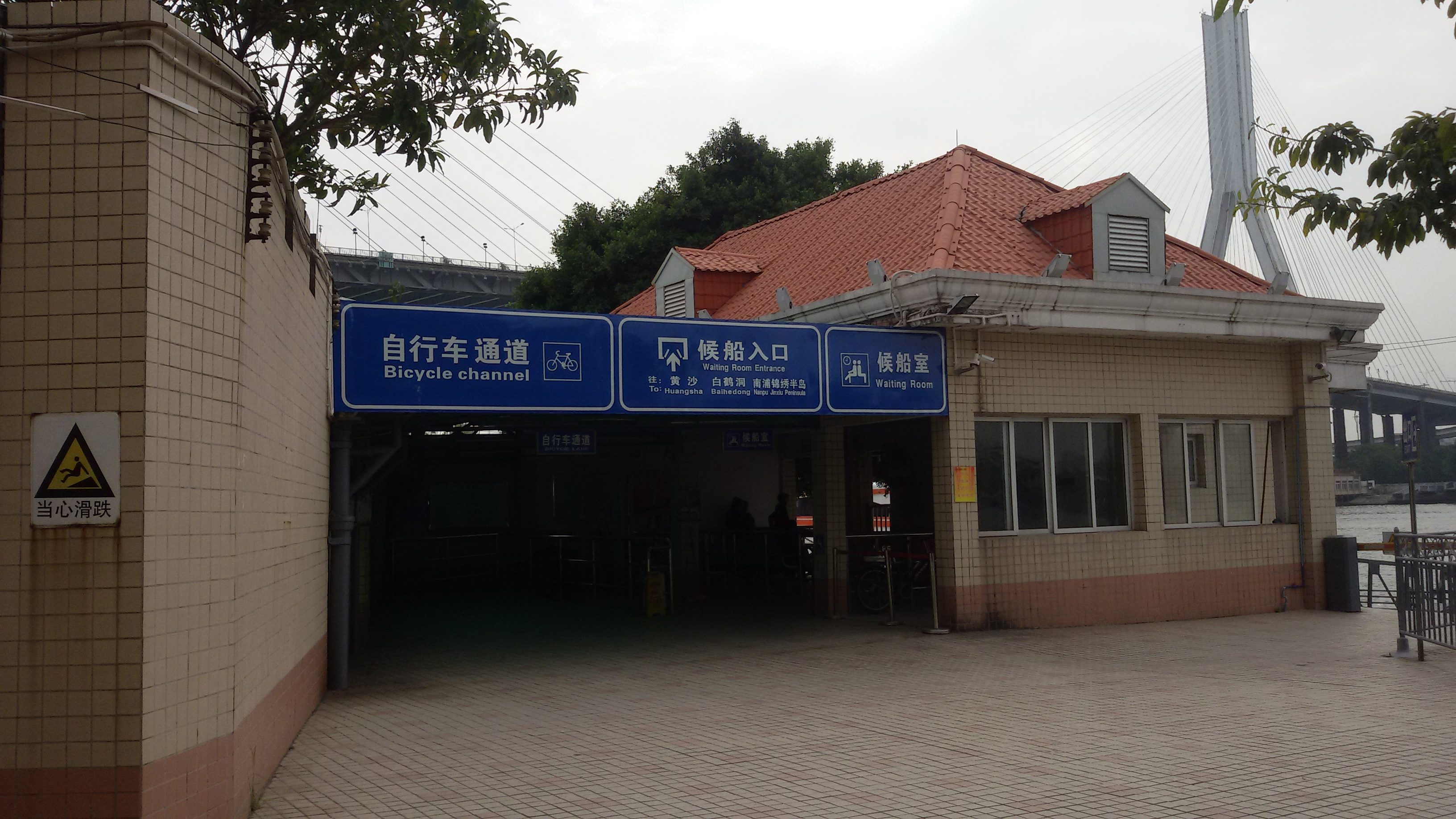 粵語: 白蚬壳码头